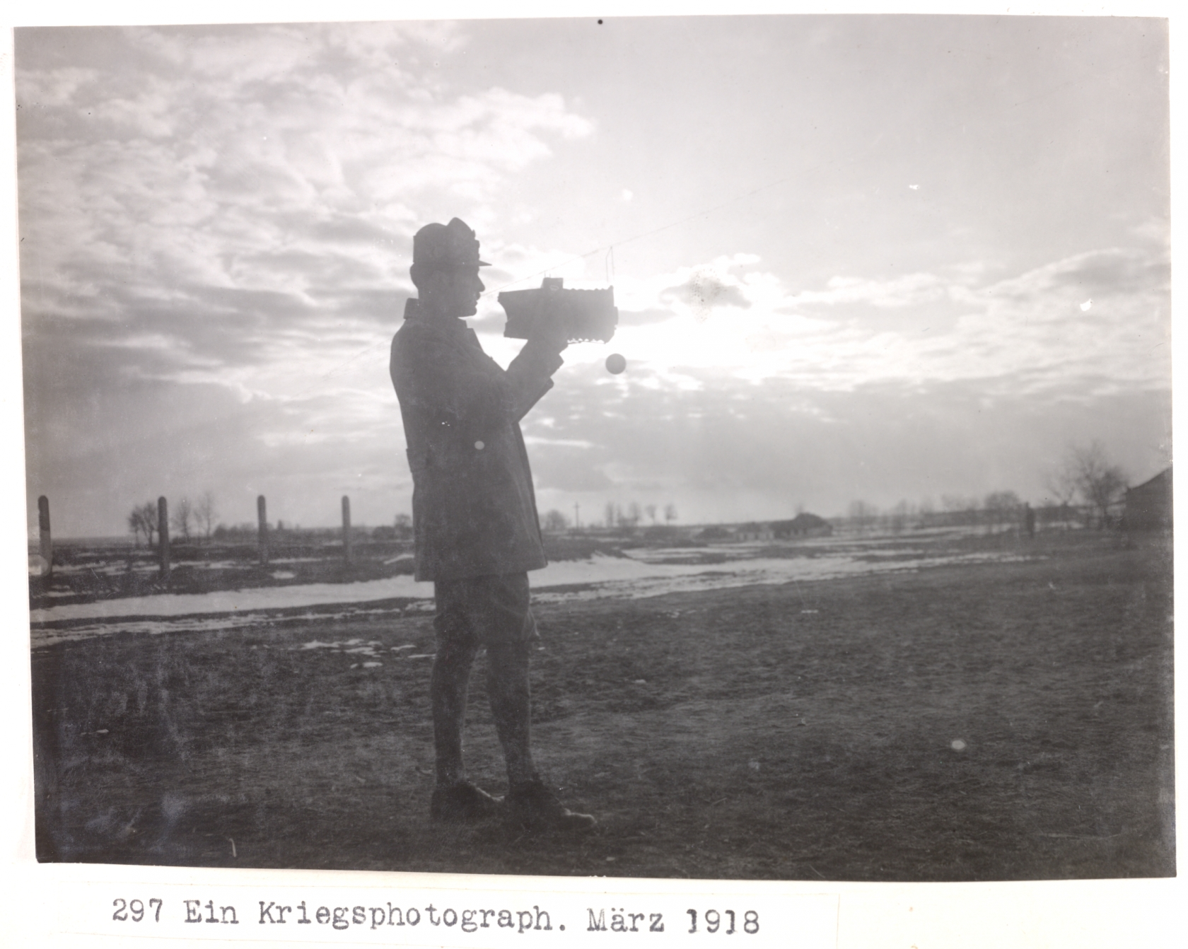 Ein Kriegsfotograf im März 1918; Umgebung von Wladimir Wolynskij, Wolhynien, Russland, Ukraine